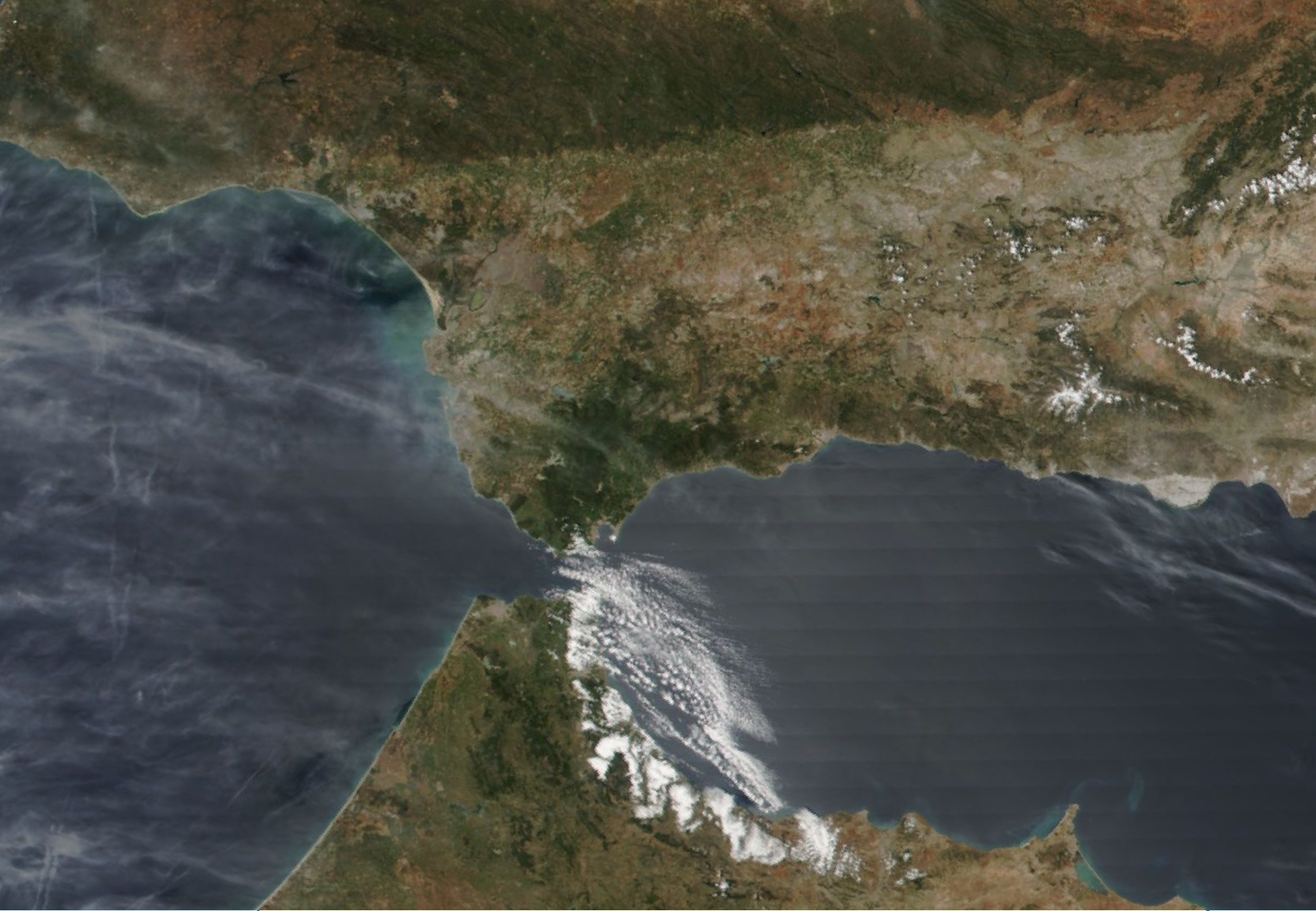 Vista del Estrecho de Gibraltar en un día de levante, el 2 de mayo de 2017